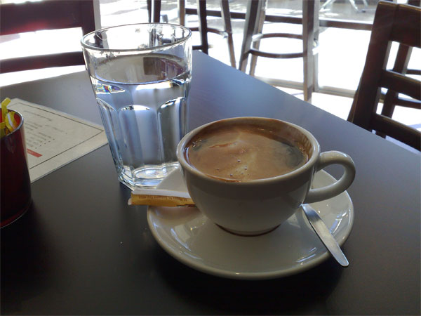 Nero Espresso long black